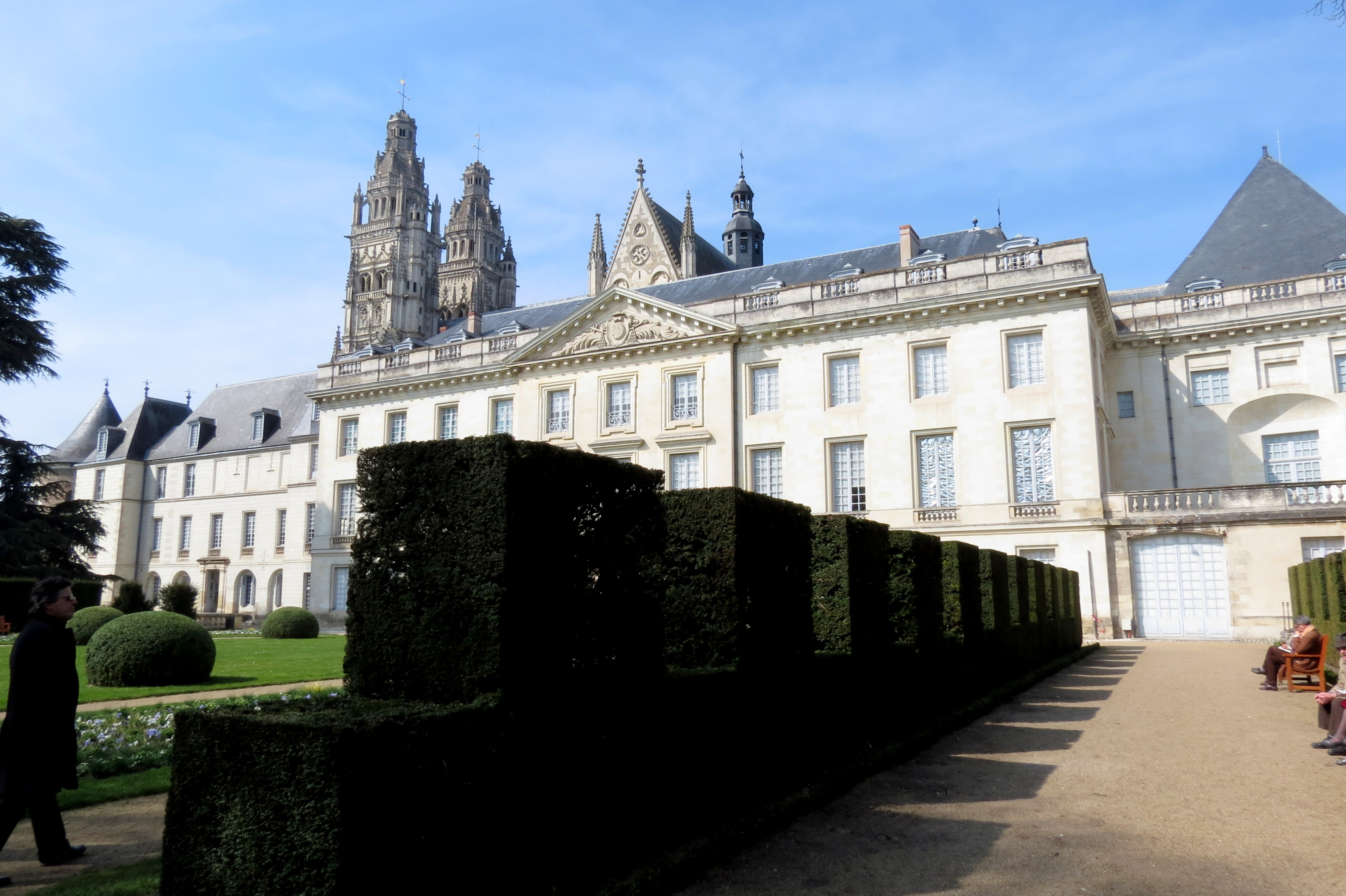 Les châteaux de la Loire.